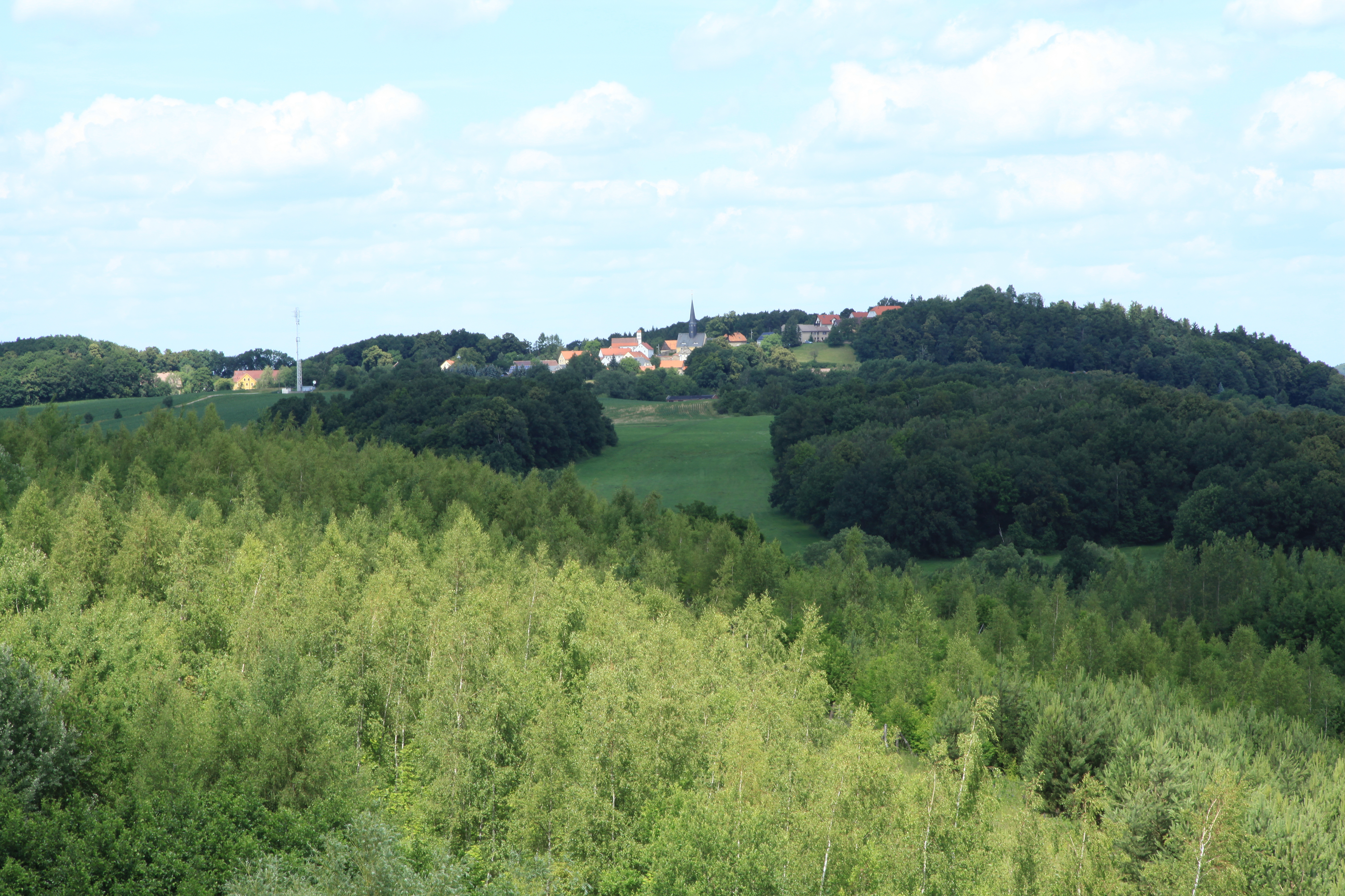 Blick vom Aussichtsturm Neuberzdorfer Höhe nach Jauernick-Buschbach (Markersdorf)